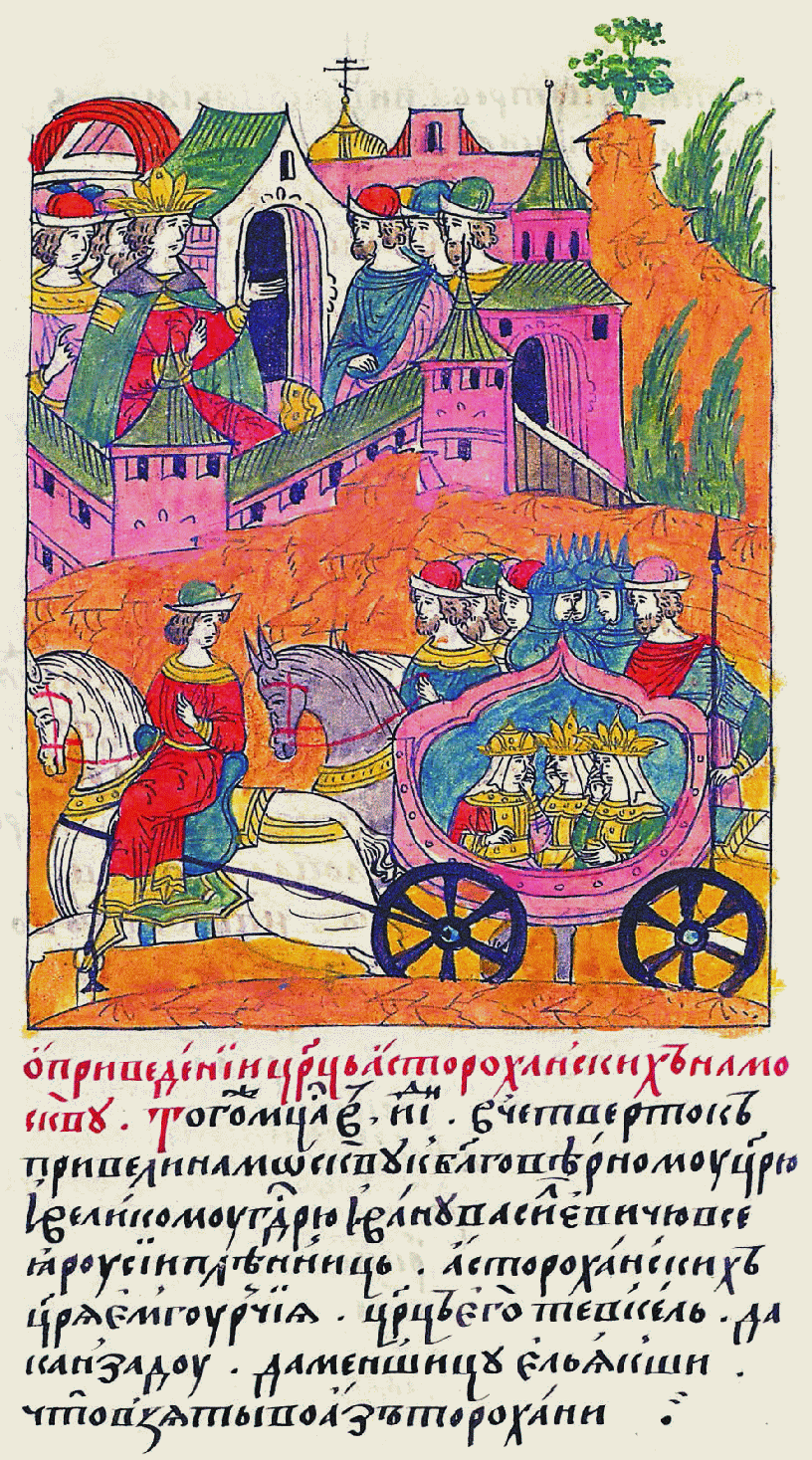 О приведении цариц астраханских в Москву. В том же месяце в 18 день в четверг привели на Москву к благоверному царю и великому государю Ивану Васильевичу всея Руси пленниц астраханских, царя Емгурчея цариц его Тевкель да Клизаду, да младшую жену Ельякши, которые были взяты в Астрахани. Миниатюра Лицевого летописного свода XVI в.